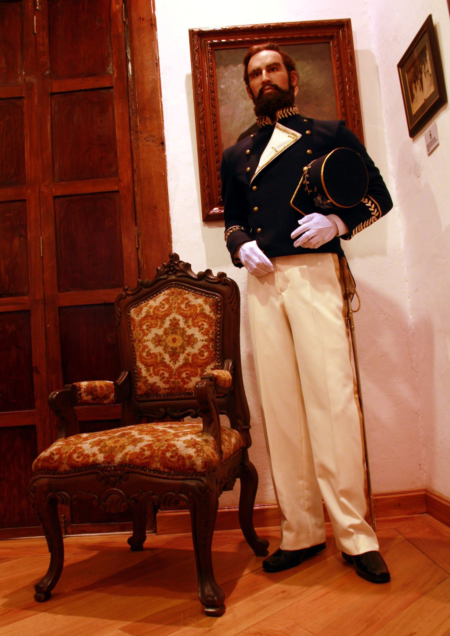 escultura de cera